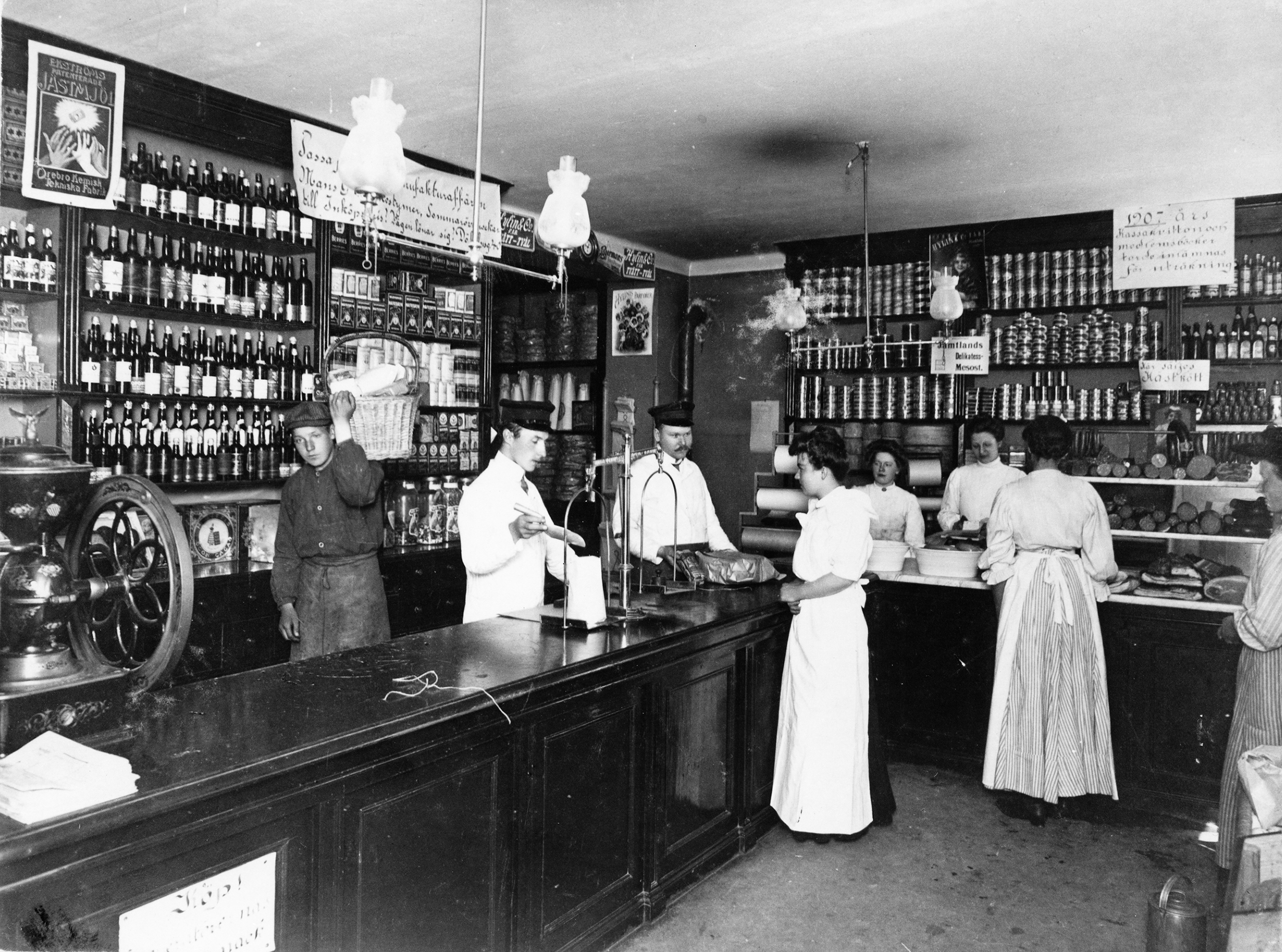 Interriör från livsmedelsbutiken Thule, filial 3, på St Paulsgatan i Stockholm. Försäljningsdisk bakom vilken två manliga expediter med vita rockar och mörka mössor expedierar. Springpojke med korg på axeln. Två kvinnliga expediter betjänar vid charkuteridisk. Butiksväggarna klädda med hyllor fyllda med diverse förpackningar. Två kvinnliga kunder.